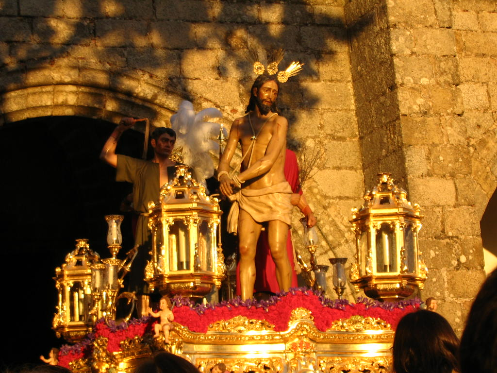 Paso del Cristo de la Sangre de la Hermandad de la Santa Vera Cruz de Aracena